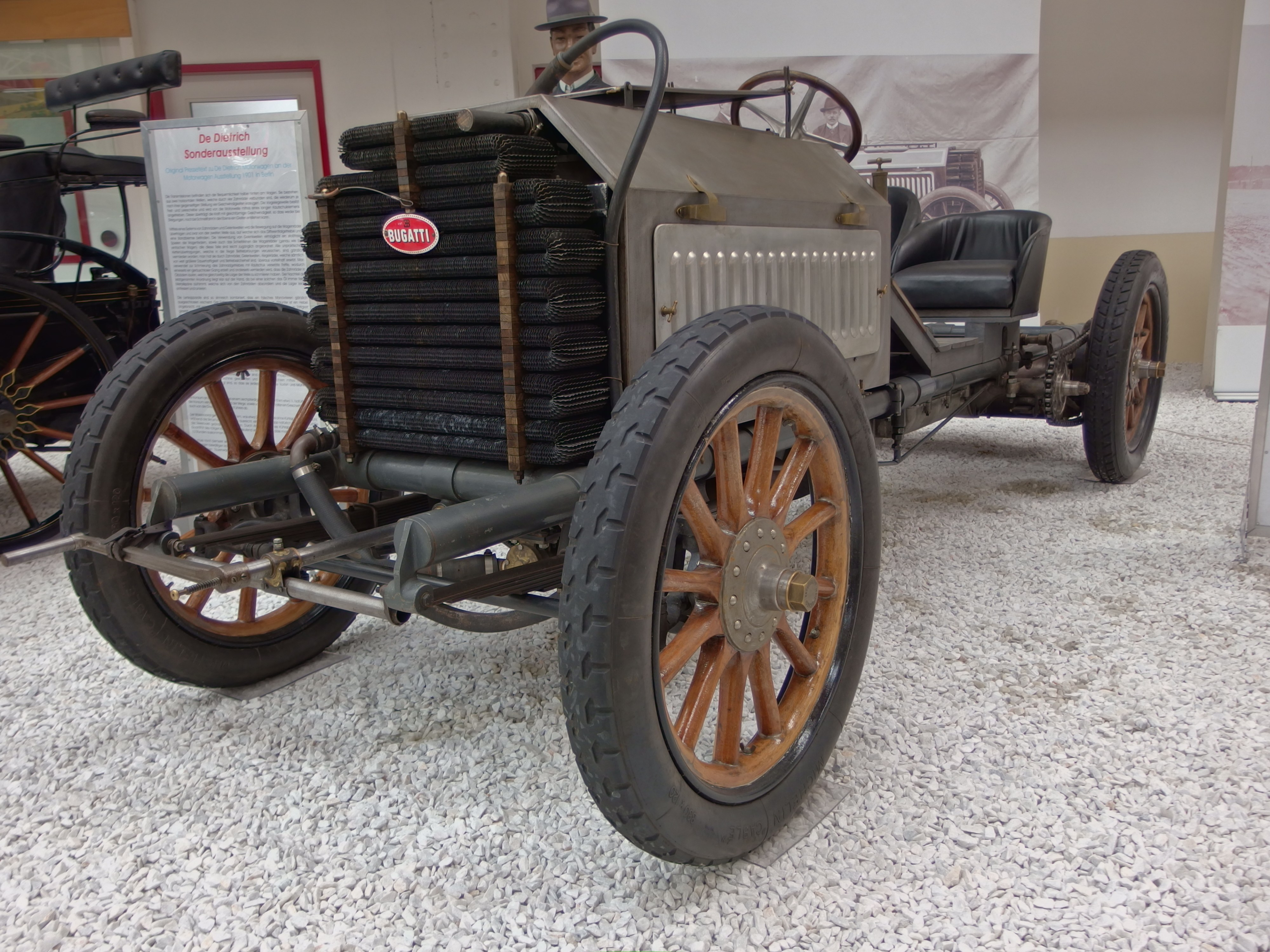 Technik Museum Speyer